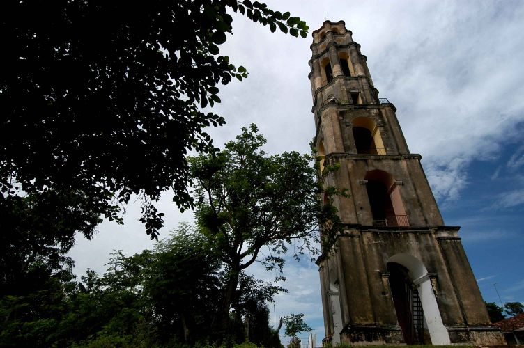 Cuba, september 2005, info in de Metadata